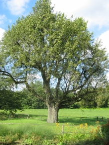 Speierling (Sorbus domestica) in Kronberg im Taunus